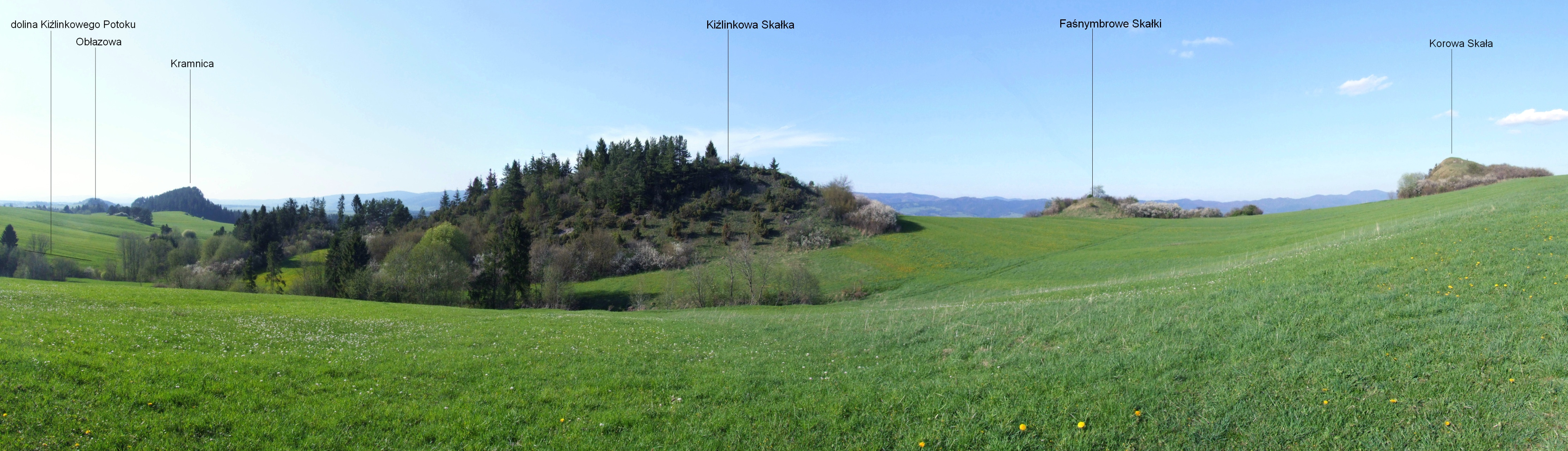 Faśnymbrowe Skałki i Korowa Skała. Widok od południowej strony